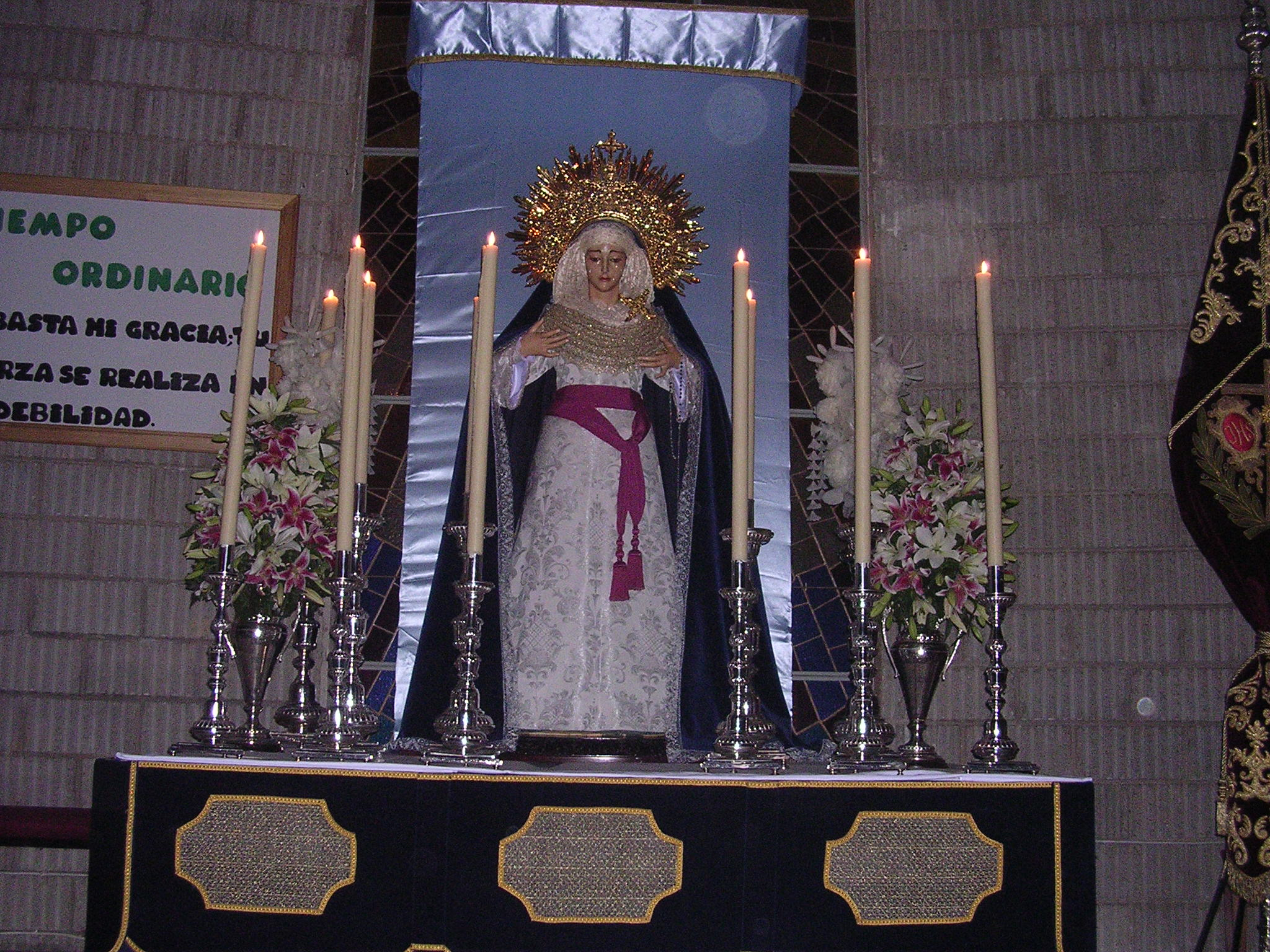 Triduo de Dolores